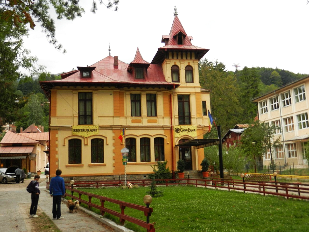 Casa George Mandrea, azi Pensiunea Duca